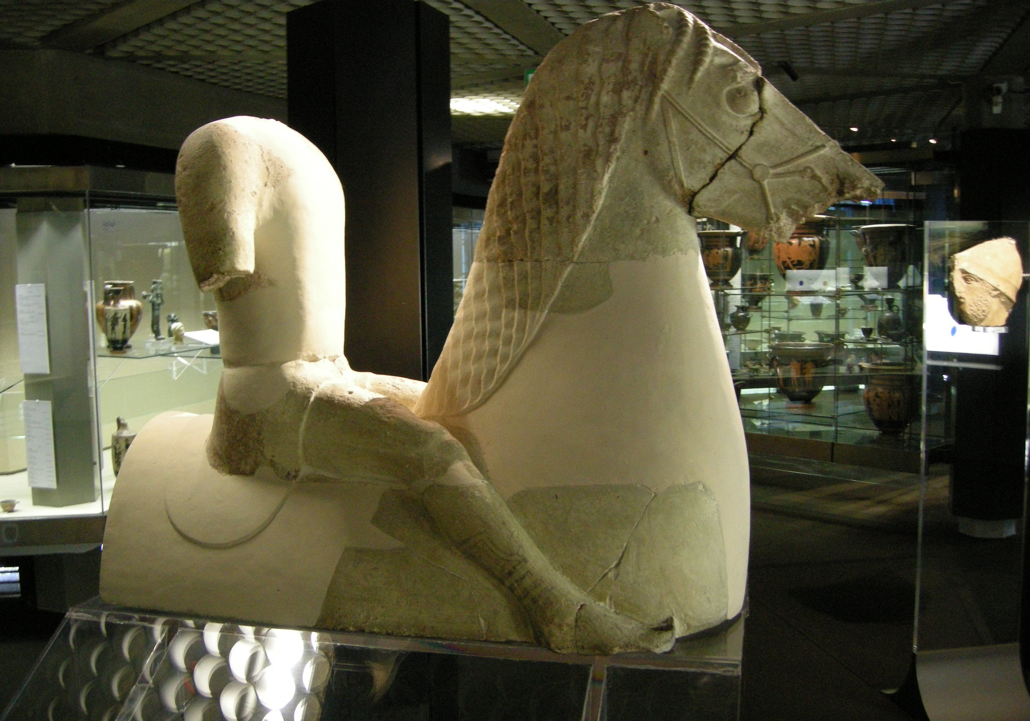 Museo archeologico regionale paolo orsi, cavaliere, forse acroterio, da Kamarina, VI sec. ac.